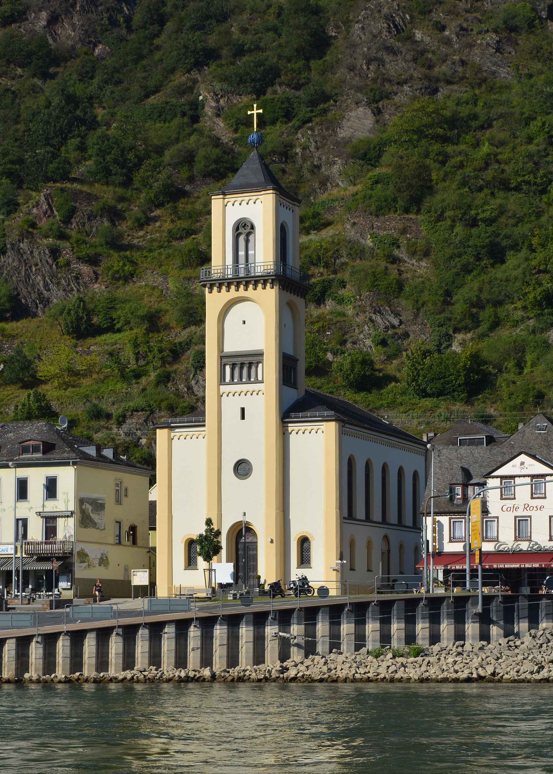 Evangelische Kirche, Sankt Goarshausen